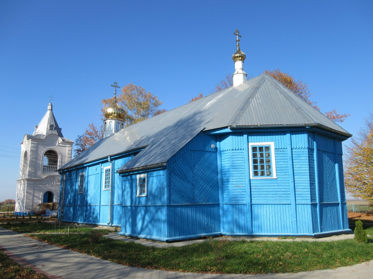 Падлессе (Ляхавіцкі раён). Свята-Духаўская царква